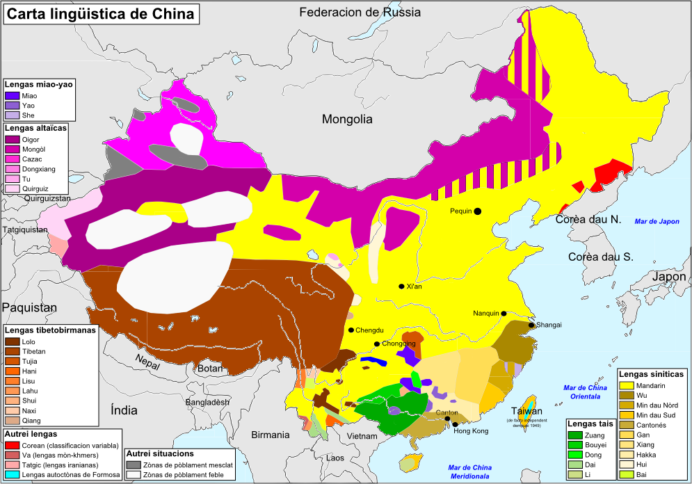 Carta lingüistica de China au començament dau sègle XXI.